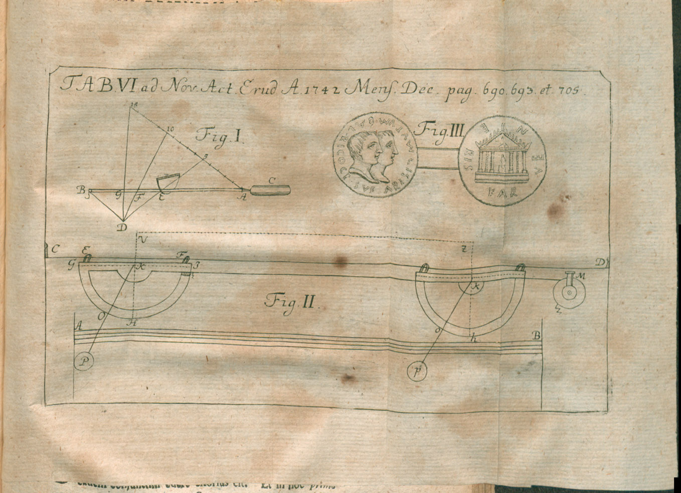 Illustration